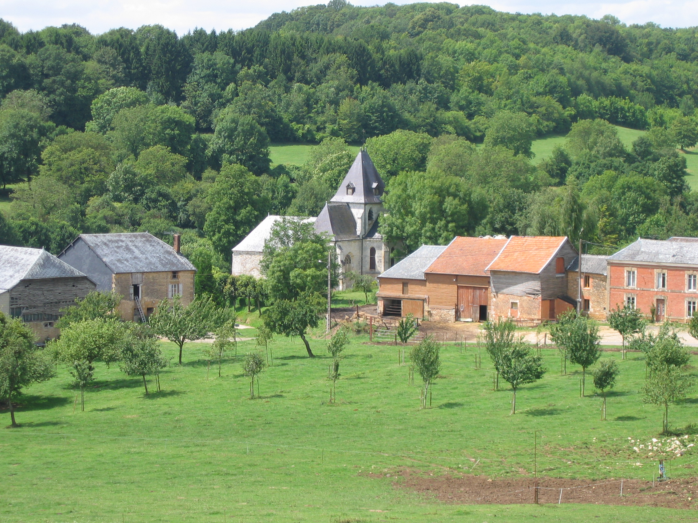 Eglise St Claire d'Hagnicourt en Ardennes (France)